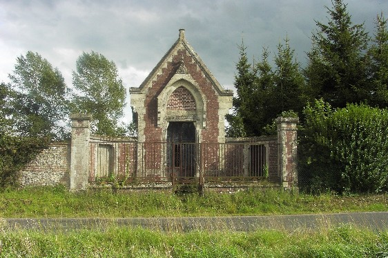 Chapelle du Geai d'Infray